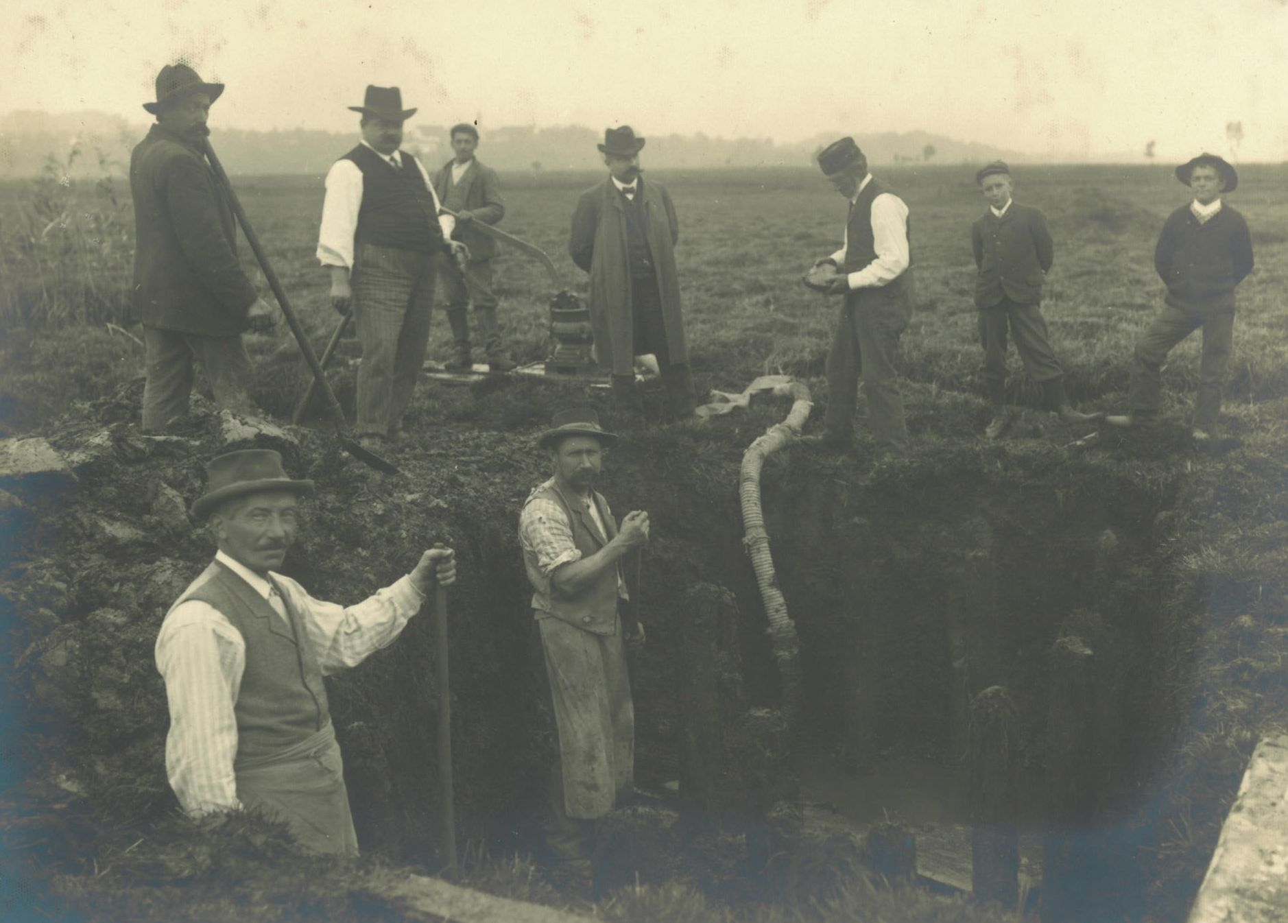 Wetzikon ZH, Grabarbeiten Pfahlbauten Robenhausen, 1908